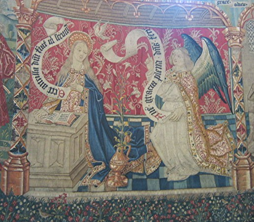 Tenture La Vie de la Vierge - Annonciation, XVe siècle, l'une des cinq tapisseries qui composent la tenture de La Vie de la Vierge, chevet de la collégiale Notre-Dame de Beaune, Bourgogne, France.